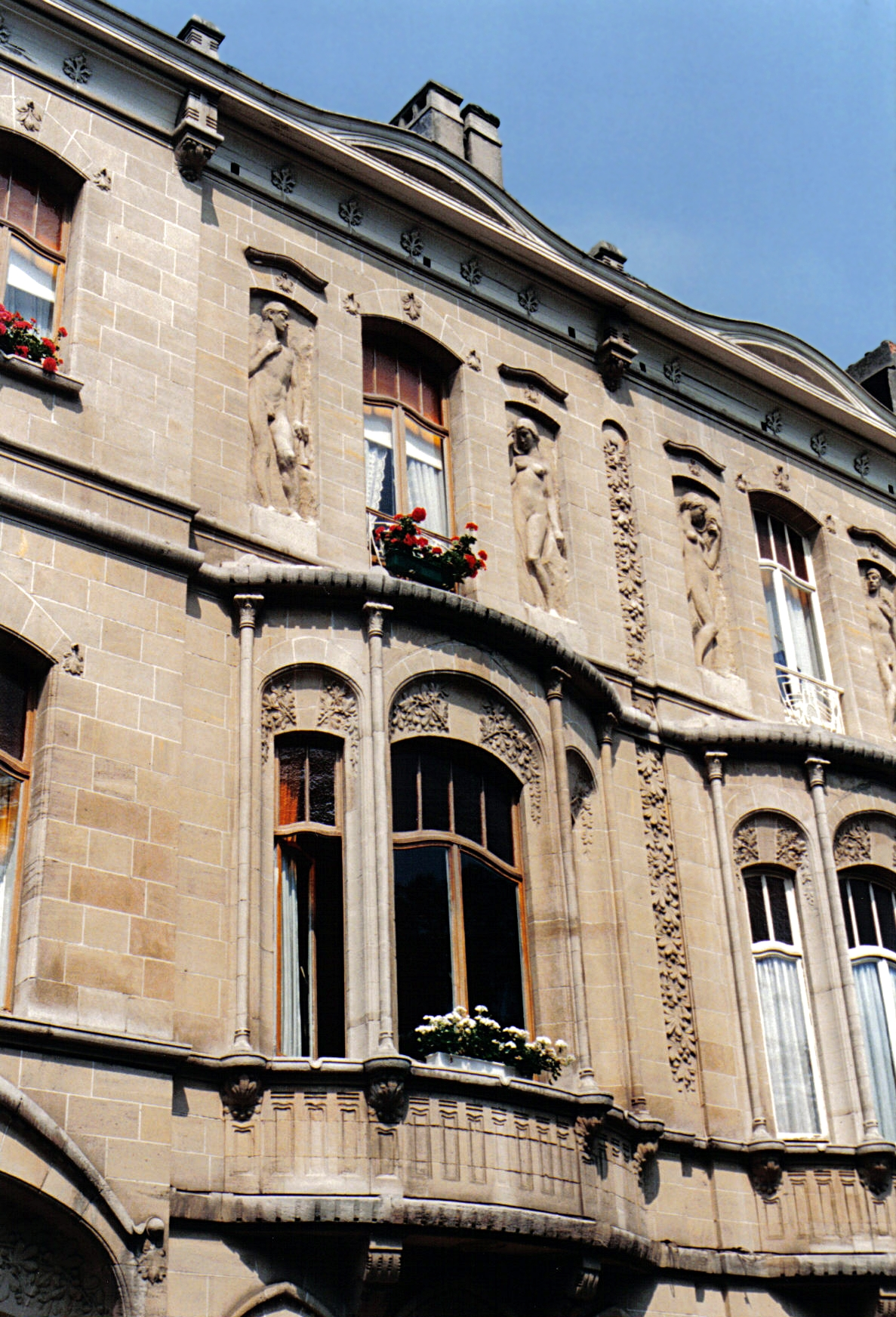 Alphonse Groothaert - Boulevard De Smet de Nayer n° 583-585 à Bruxelles (Art nouveau)